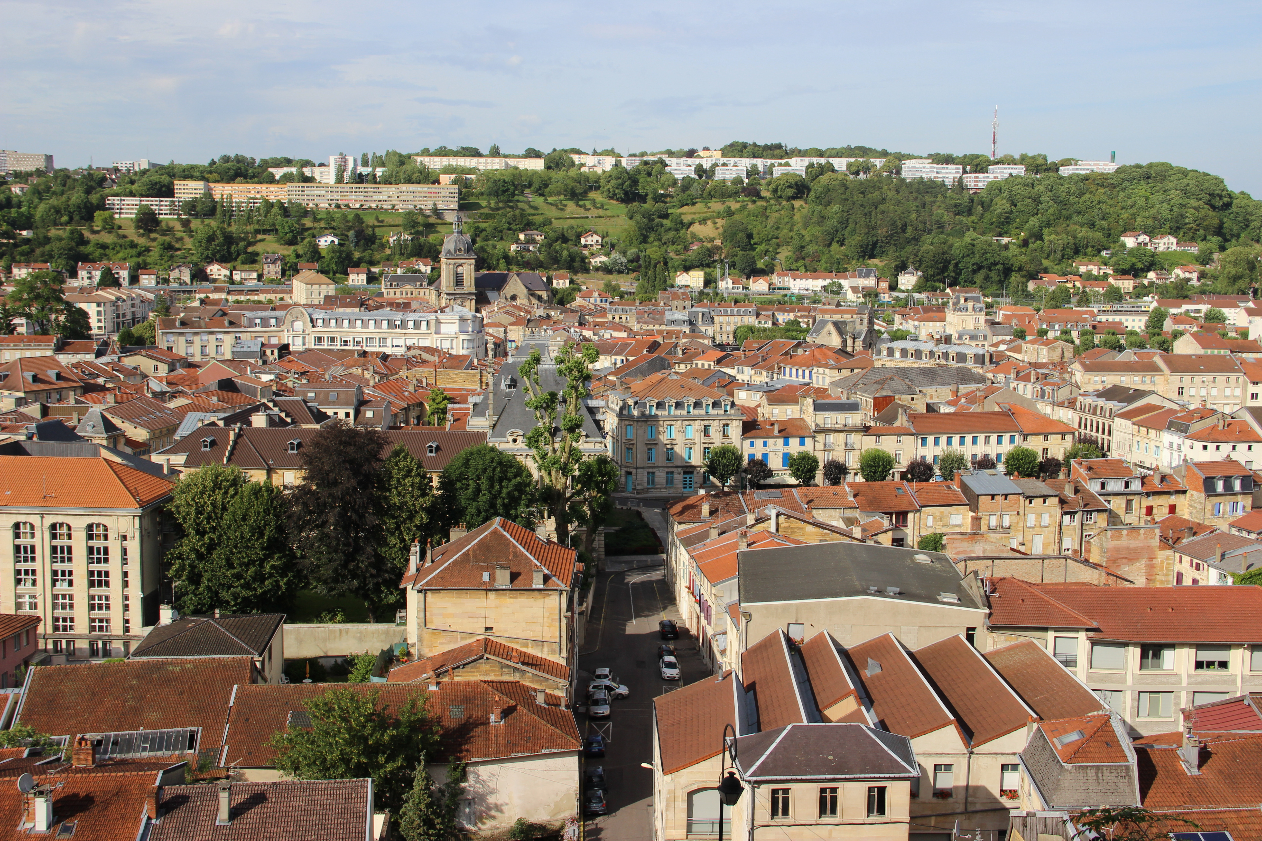 Panorama de Bar-le-Duc